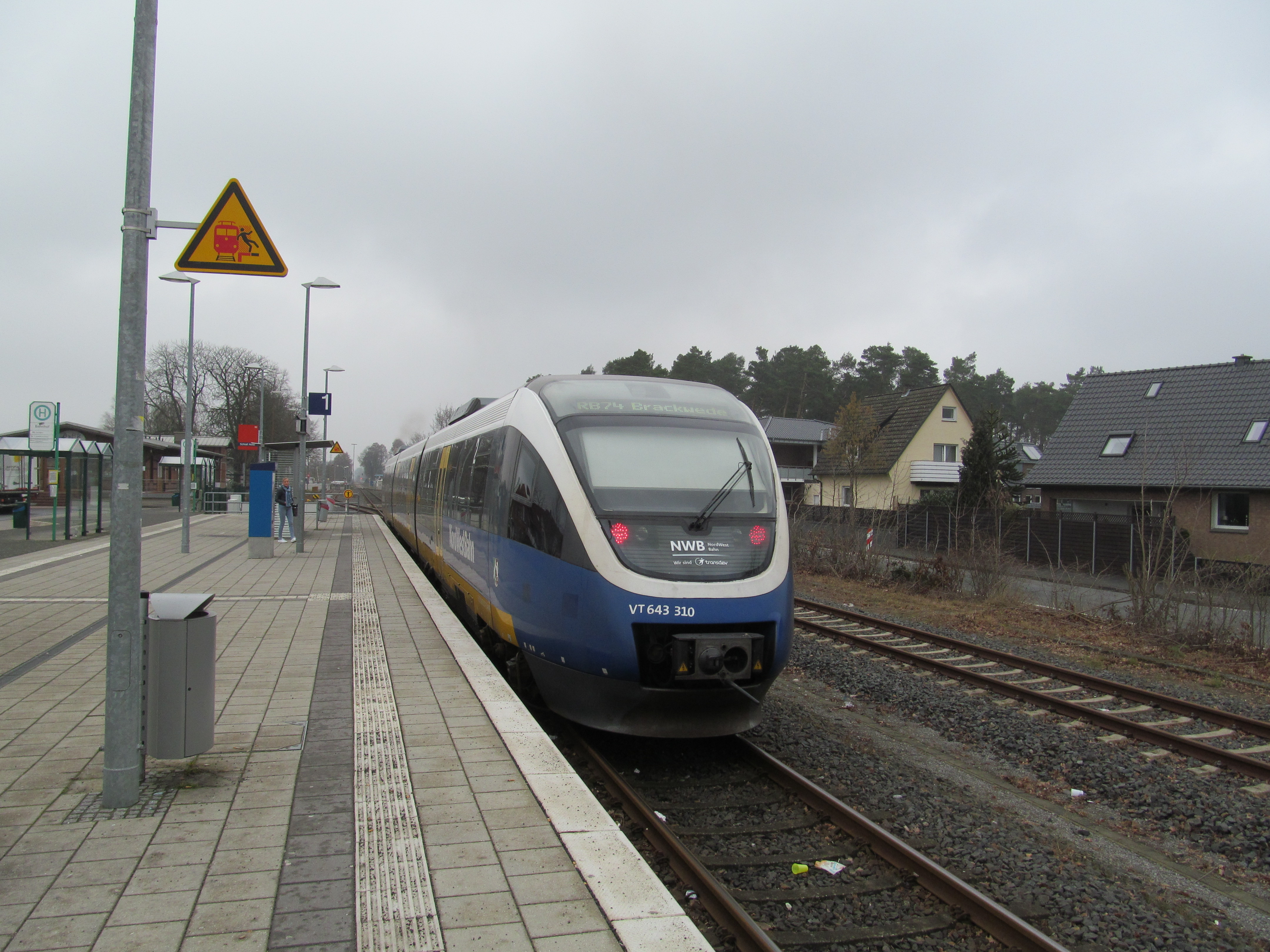 ein Zug der Linie RB 74 verlässt den Bahnhof Schloss Holte-Stukenbrock in Richtung Brackwede